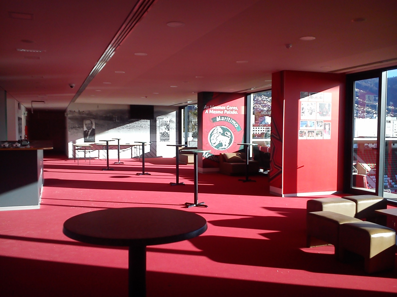 Tribuna Presidencial do Estádio dos Barreiros